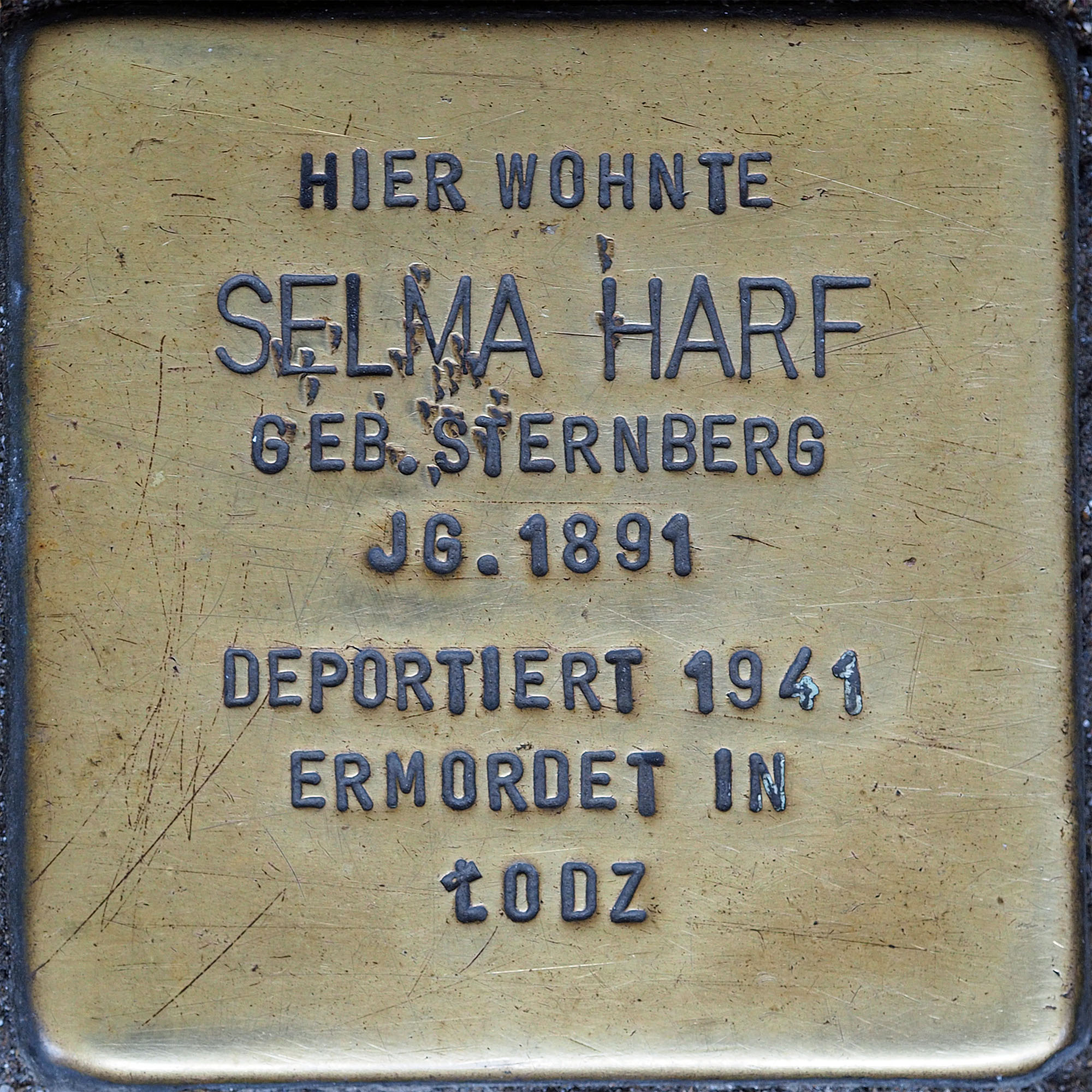 Stolpersteine MG: Harf, Selma